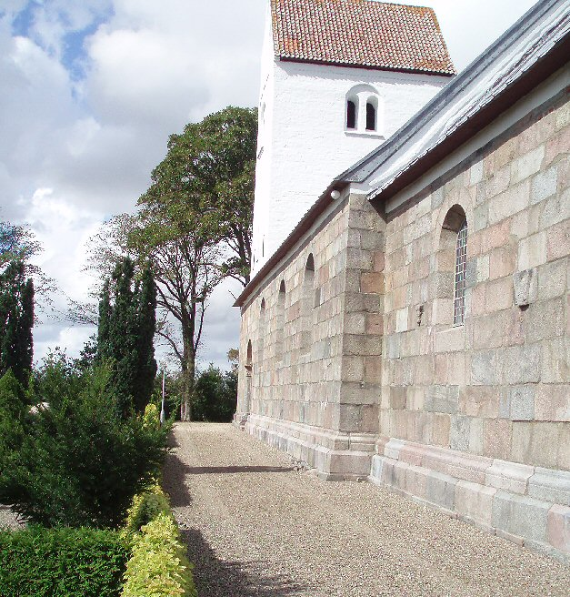 Lybe Kirke august 2007